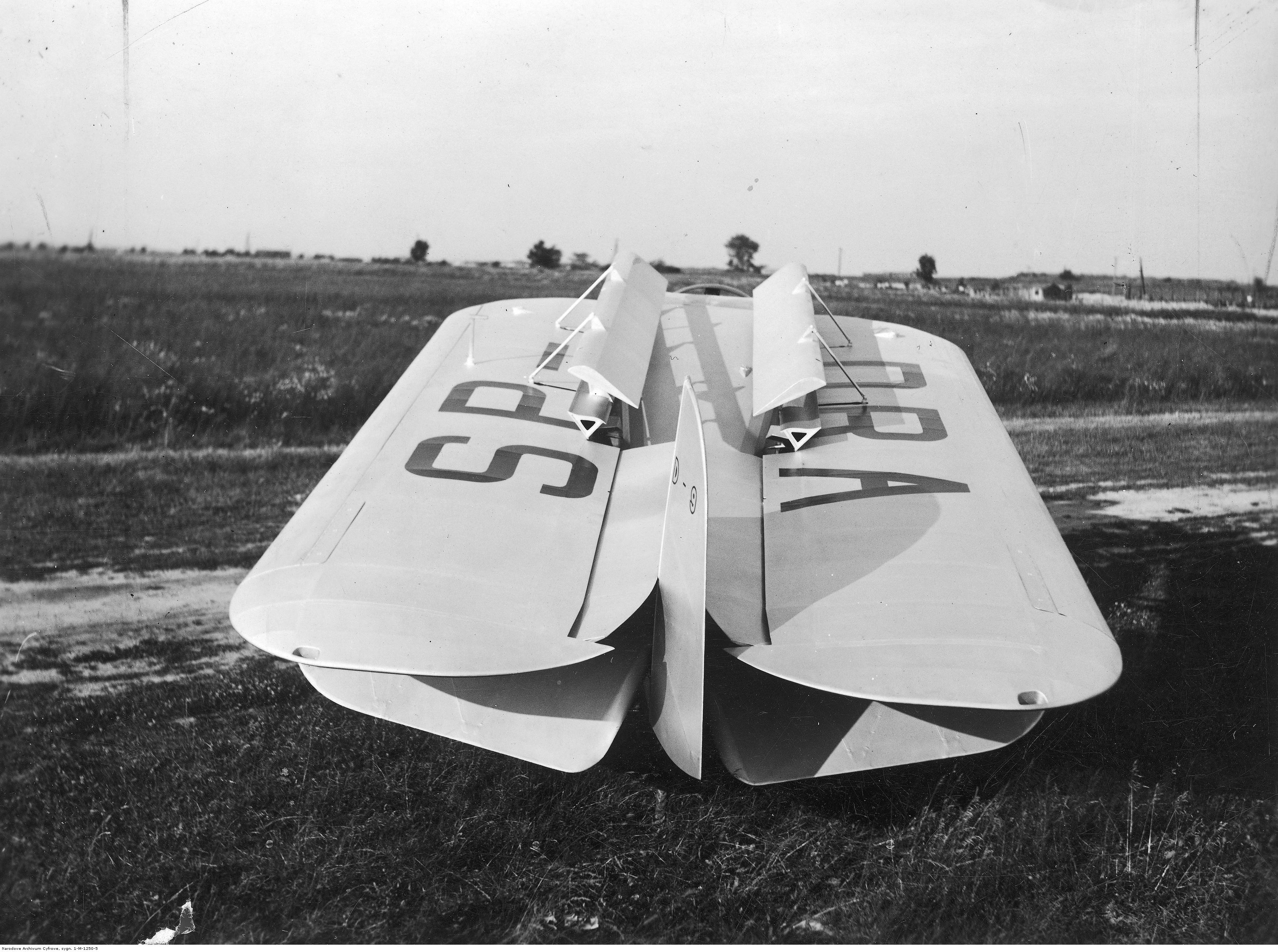 Międzynarodowe Zawody Samolotów Turystycznych (Challenge 1934) w Warszawie. Samolot RWD-9 ze złożonymi skrzydłami. Koncern Ilustrowany Kurier Codzienny - Archiwum Ilustracji. Sygnatura: 1-M-1250-5